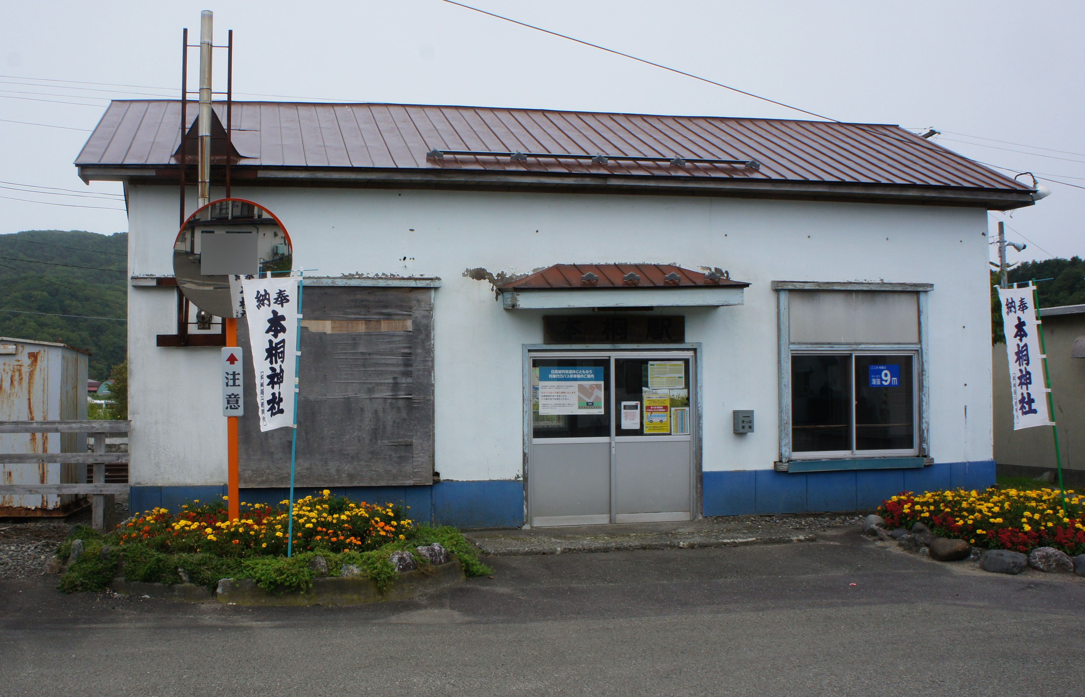 JR日高本線・本桐駅の駅舎